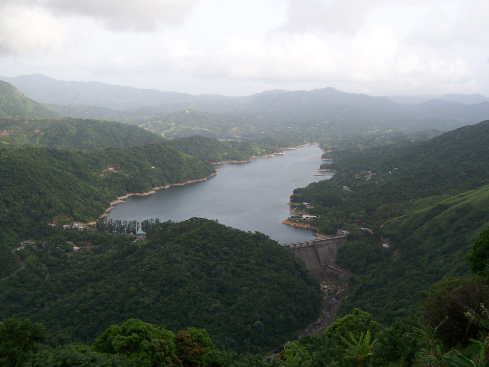 Lago Caonillas within Barrios Caonillas Abajo, Caonillas Arriba, and Las Palmas.